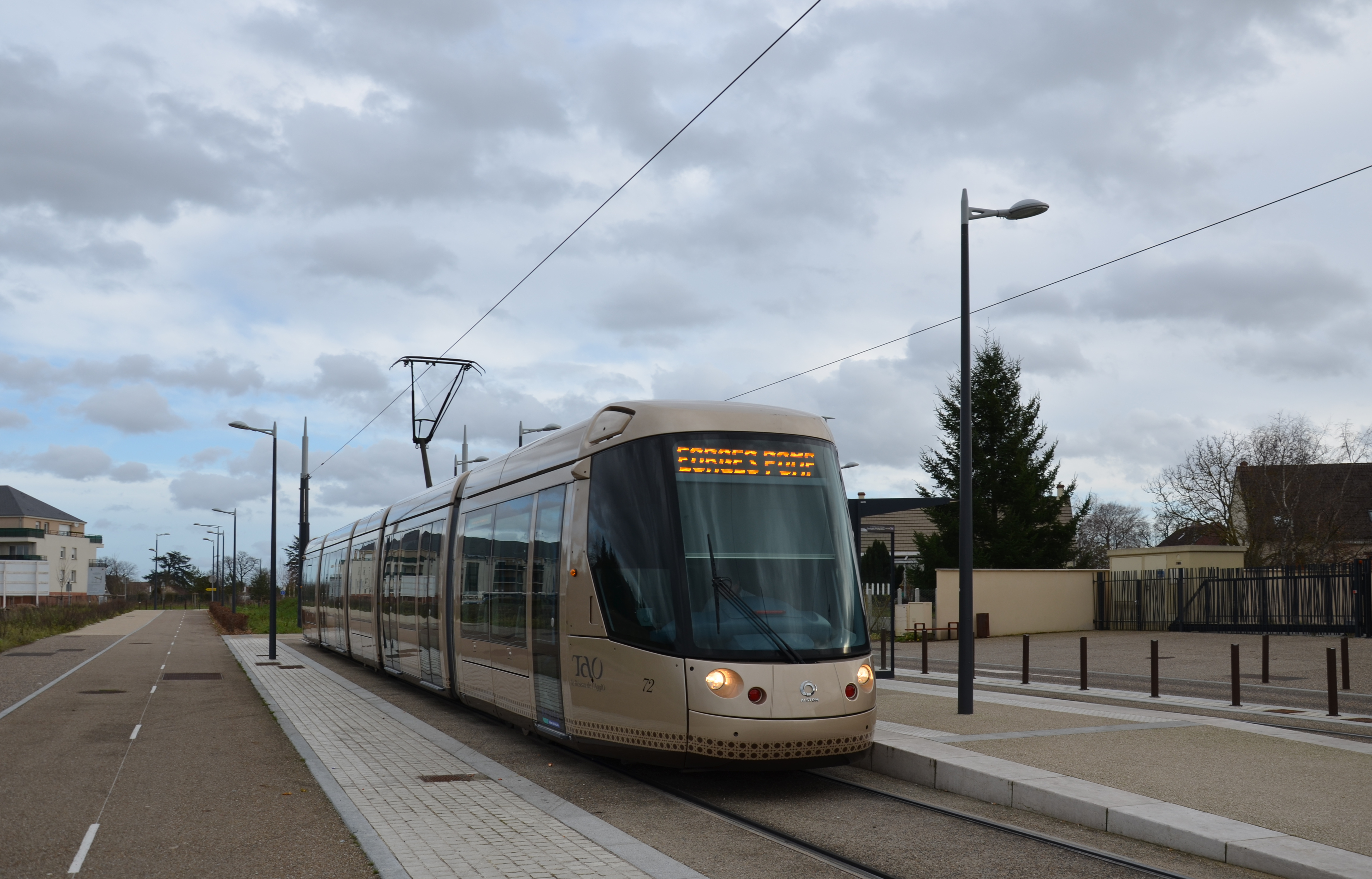 La rame Alstom Citadis 302 n°72 du réseau TAO d'Orléans est à son terminus Clos du Hameau sur la ligne B, en attente de départ en direction de Georges Pompidou.